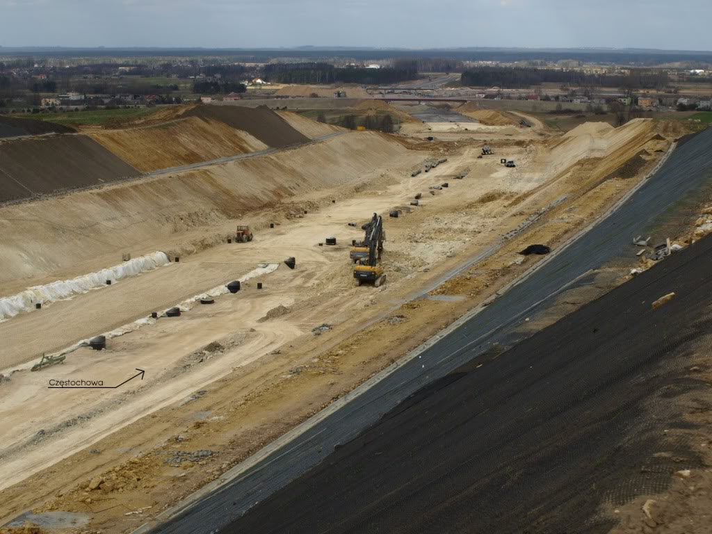 Der Bau der polnischen Autobahn A1 auf dem Abschnitt Piekary Slaskie-Pyrzowice in Richtung Pyrzowice im April 2011.